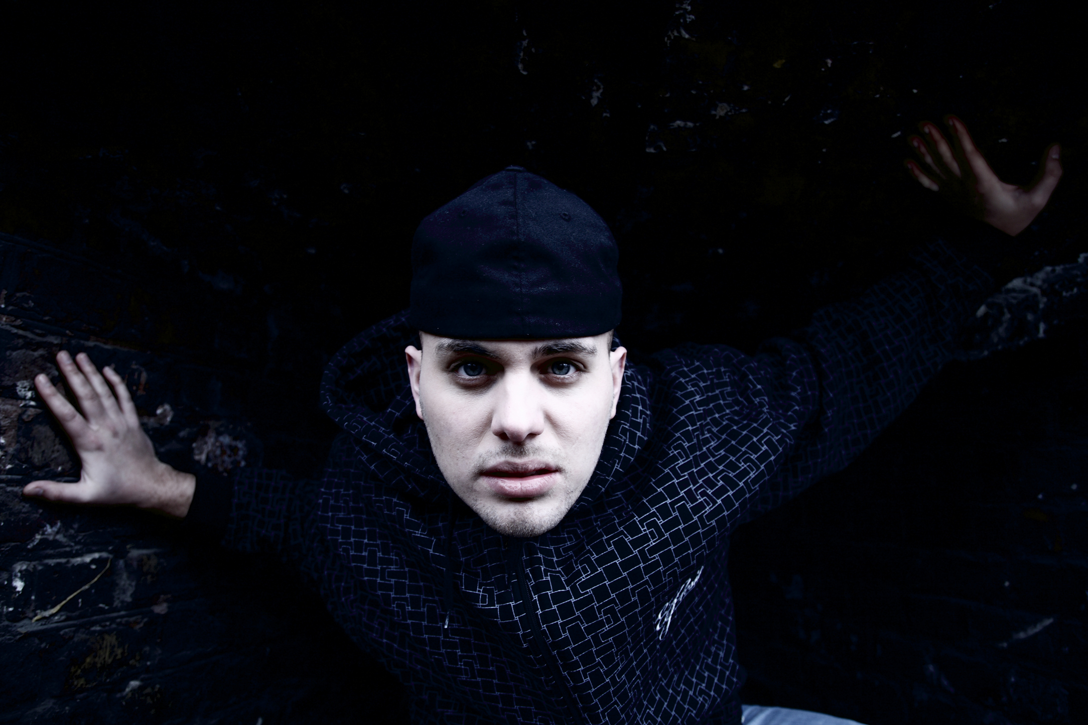 Favorite - Pressefoto